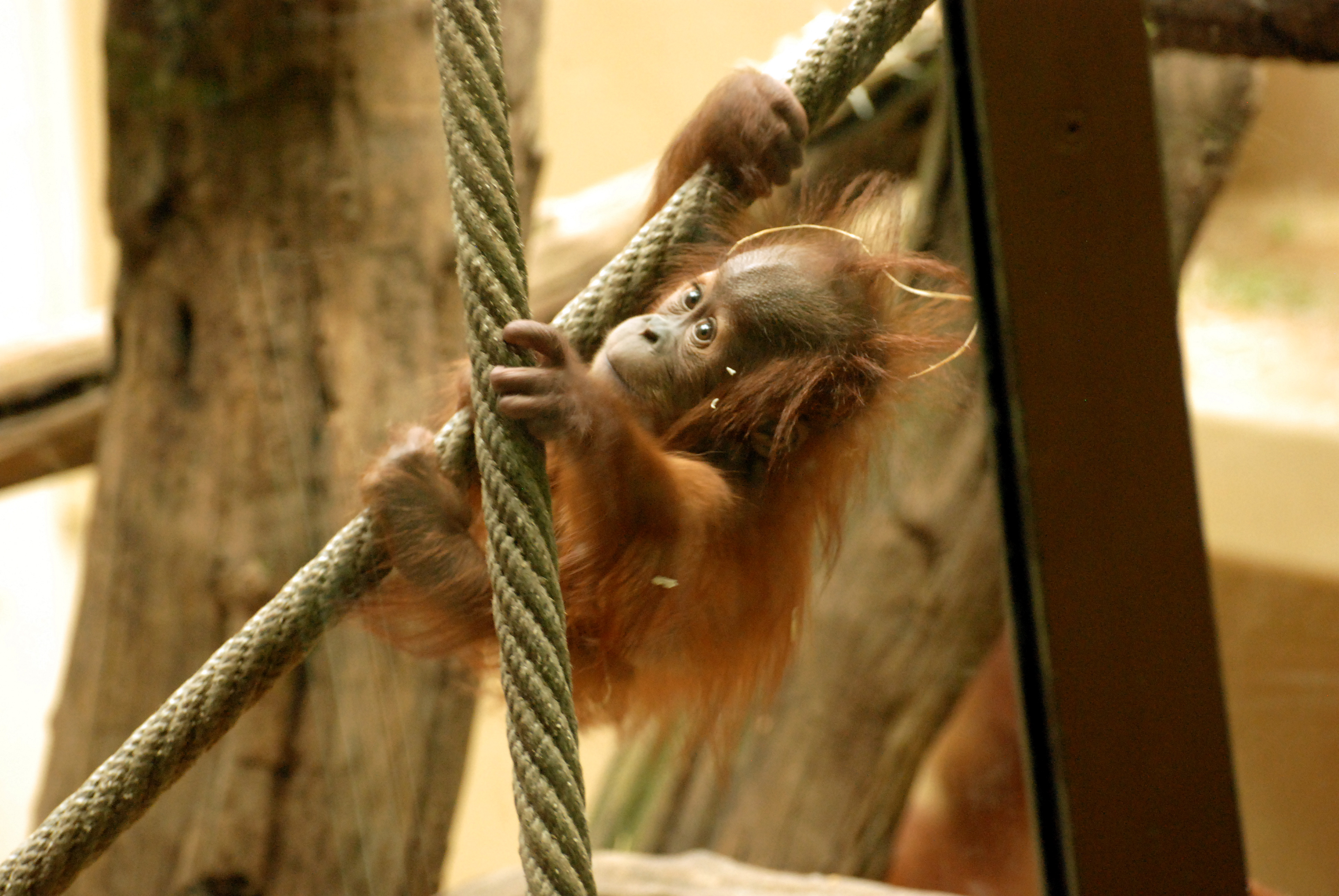 Im Zoo Zürich